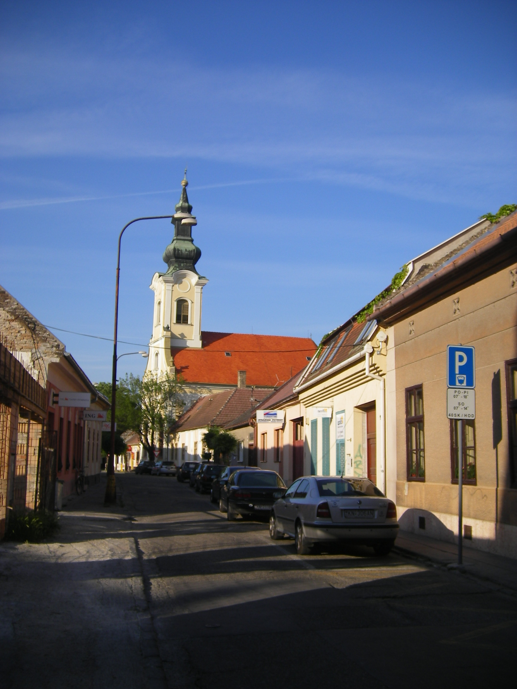 Komárom - Ferences barátok utcája háttérben az evangélikus templommal